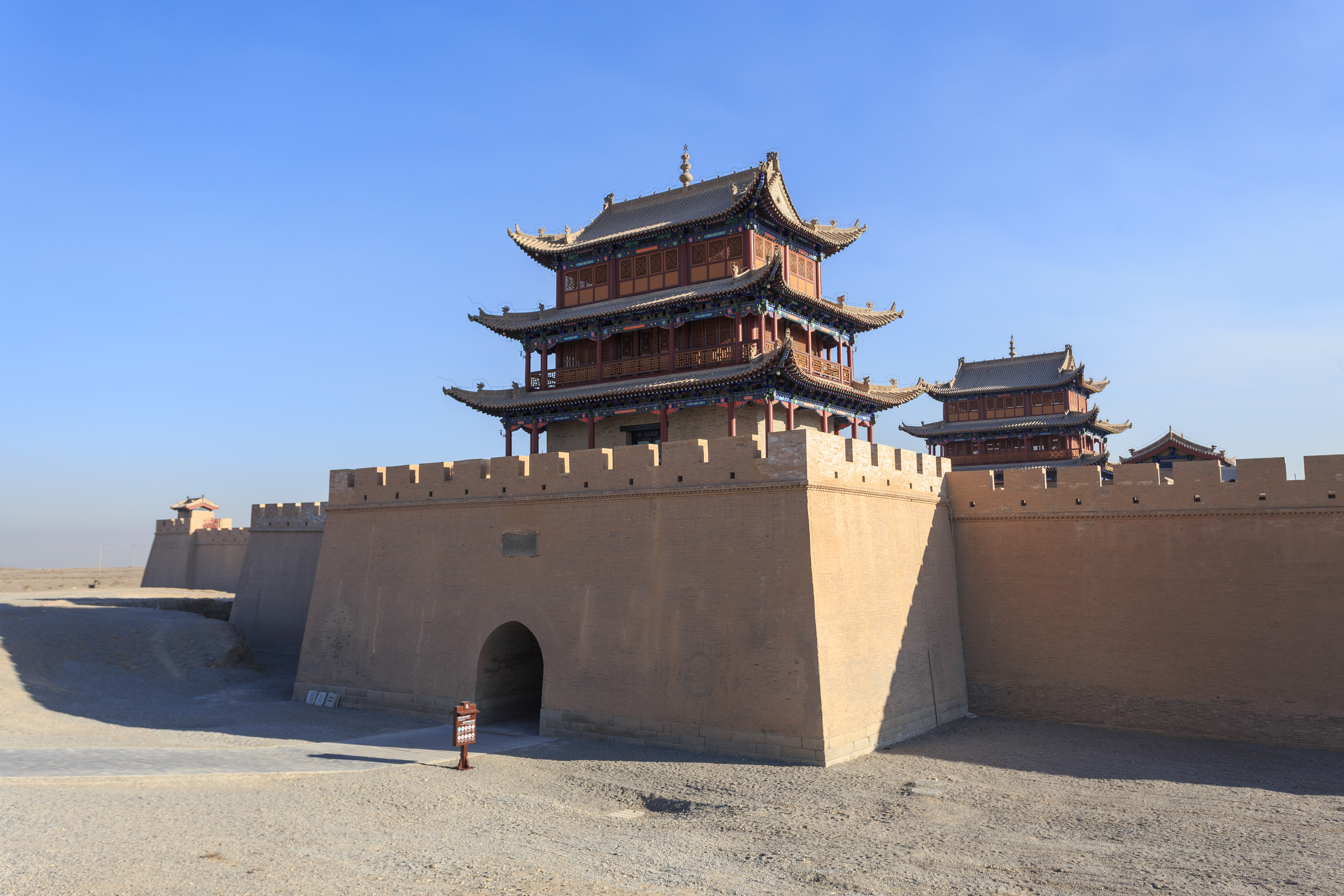 嘉峪关